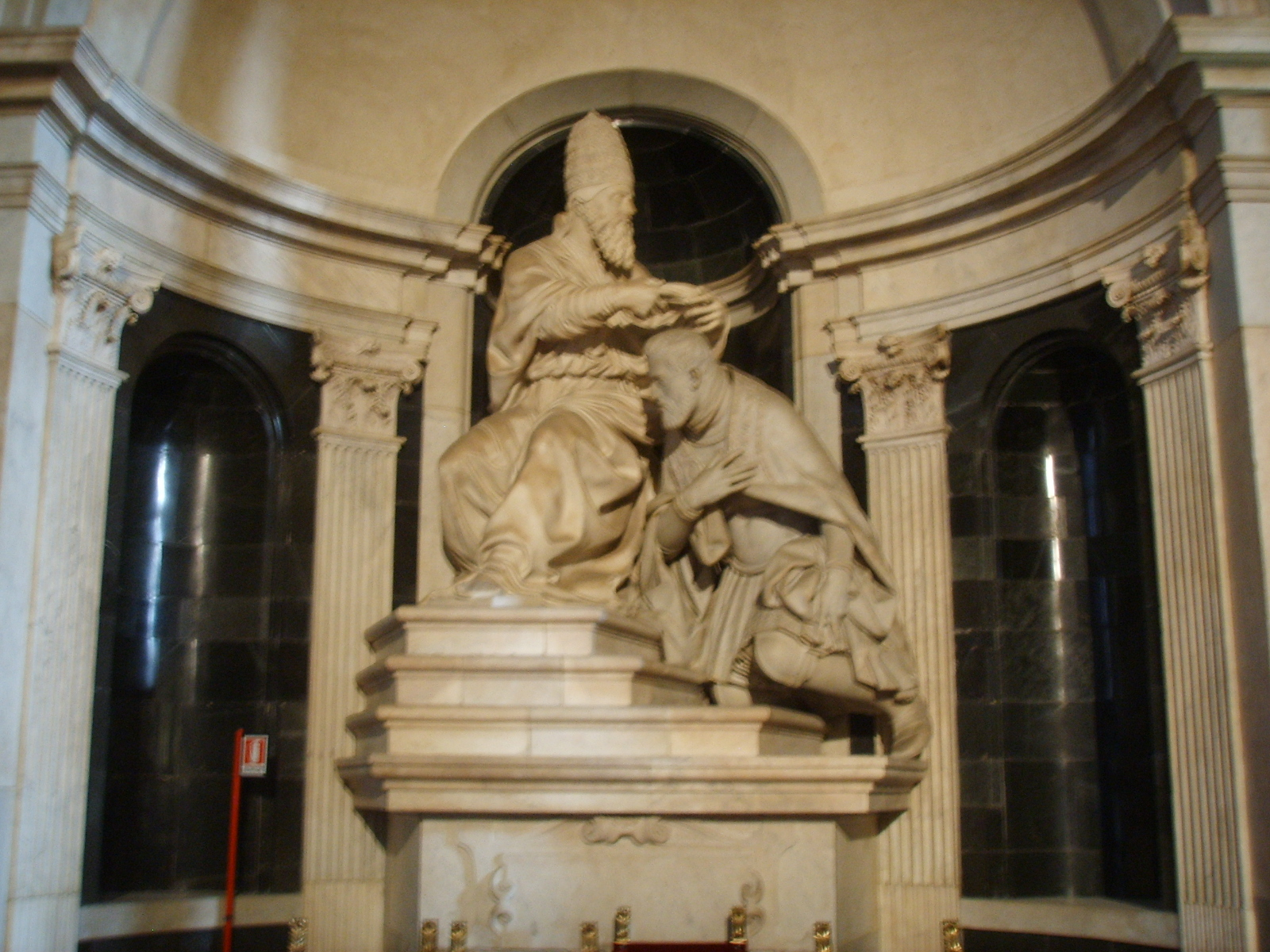 Clemente VII che incorona Carlo V; opera scultorea di Baccio Bandinelli (il papa) e Giovan Battista Caccini (l'imperatore); Firenze, Palazzo Vecchio (Palazzo della Signoria), Salone de' Cinquecento, Tribuna dell'Udienza, parete destra.